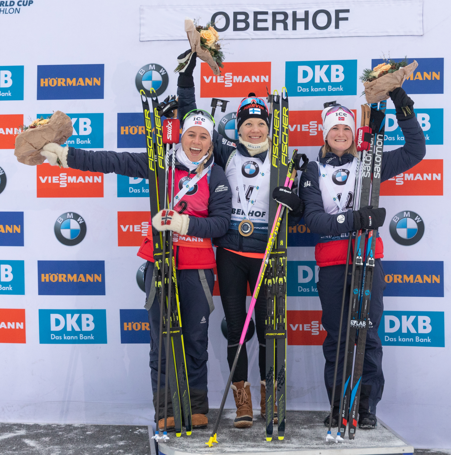 IBU World Cup Biathlon Oberhof; v.li.: Tiril Eckhoff (NOR, Norwegen), Kaisa Makarainen (FIN, Finnland), Marte Olsbu Roeiseland (NOR, Norwegen); Flower Ceremony, Blumenzeremonie, Siegerehrung; Jubel, celebration